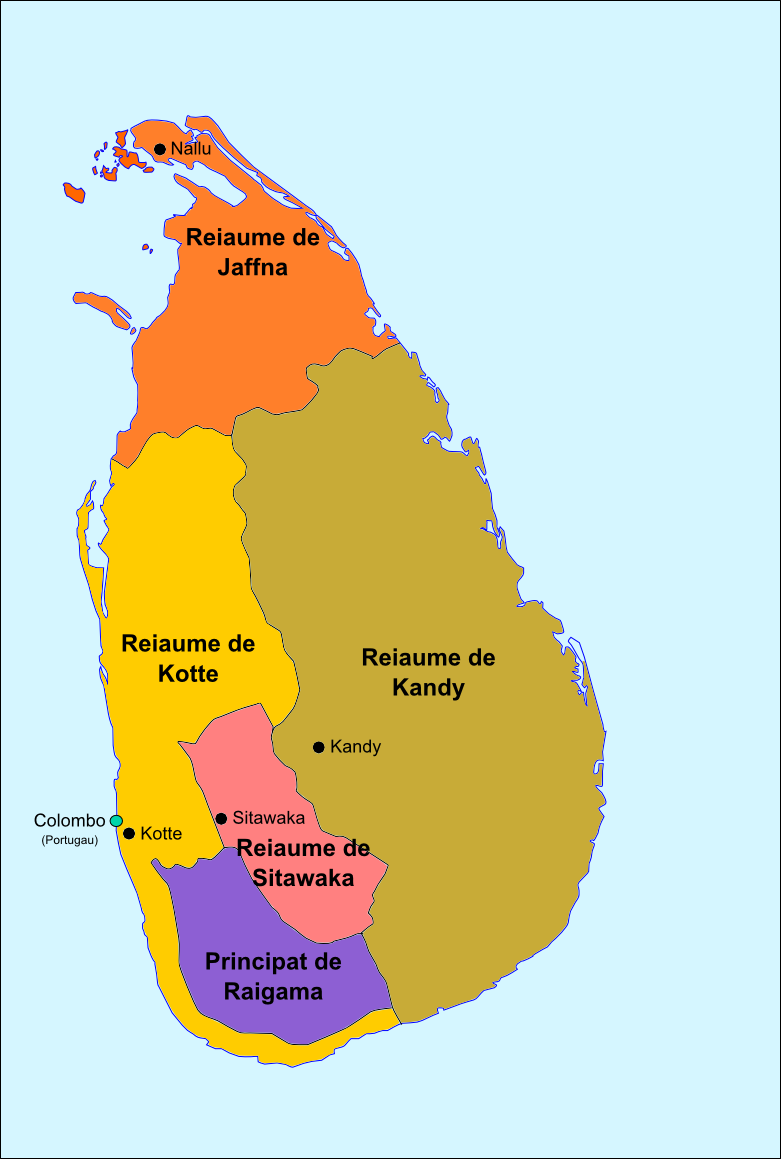 Division territòriala de Ceilan en 1520